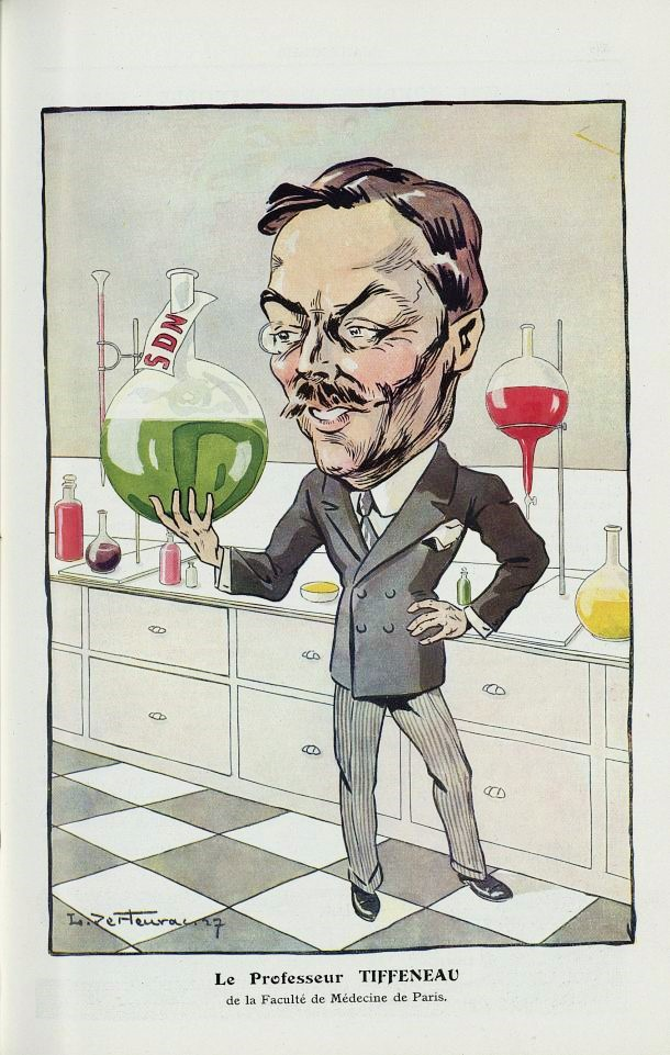 Portrait charge (1927)